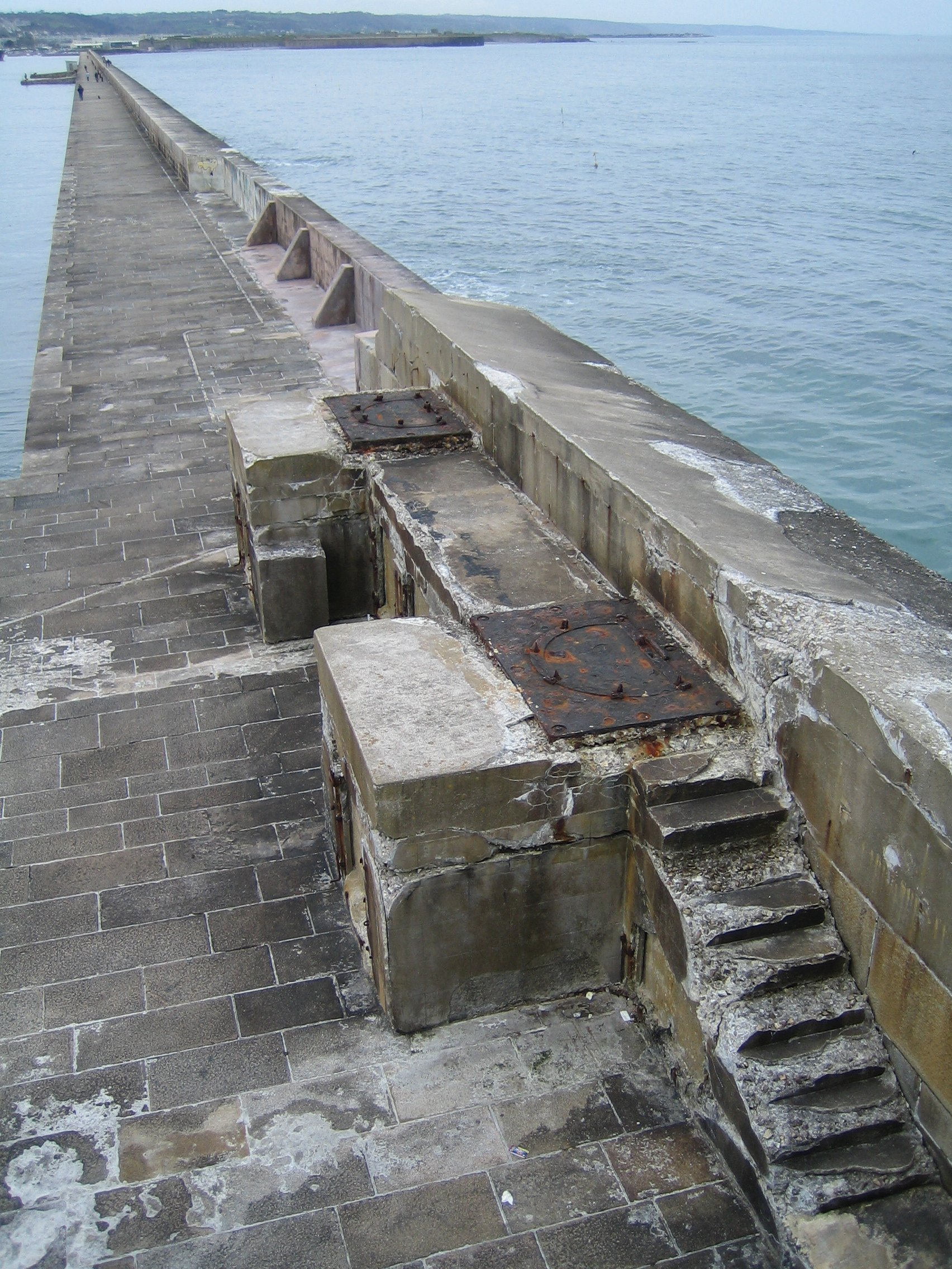 Rade de Cherbourg (Cherbourg roadstead, France) : Digue de Querqueville de la grande rade (Querqueville sea wall)